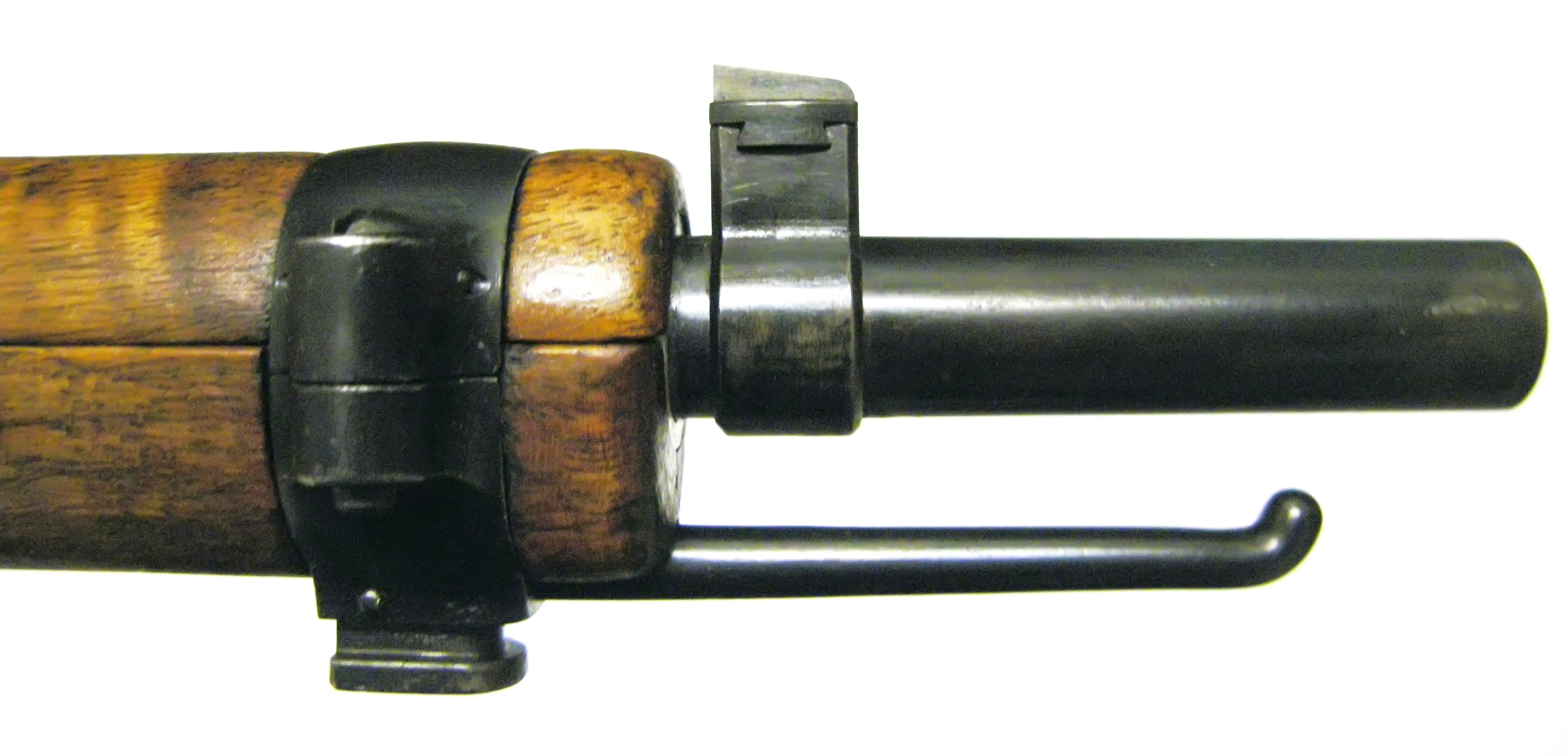 Bouche du fusil suisse d’infanterie 1911